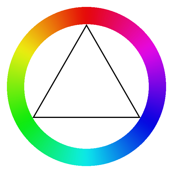 Kleurcirkel met meer kleuren, eigen werk